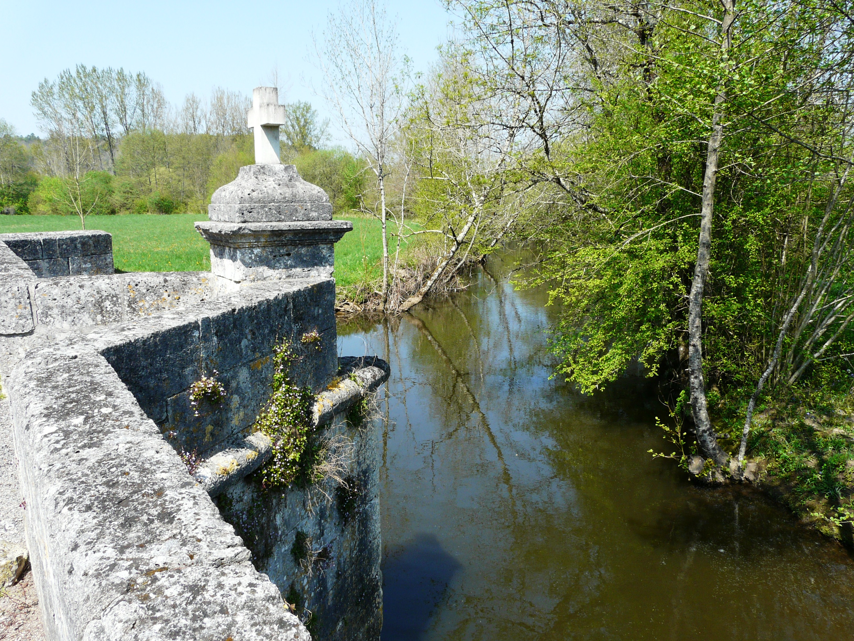 La Dronne en amont du vieux pont à l'ouest du bourg, Quinsac, Dordogne, France